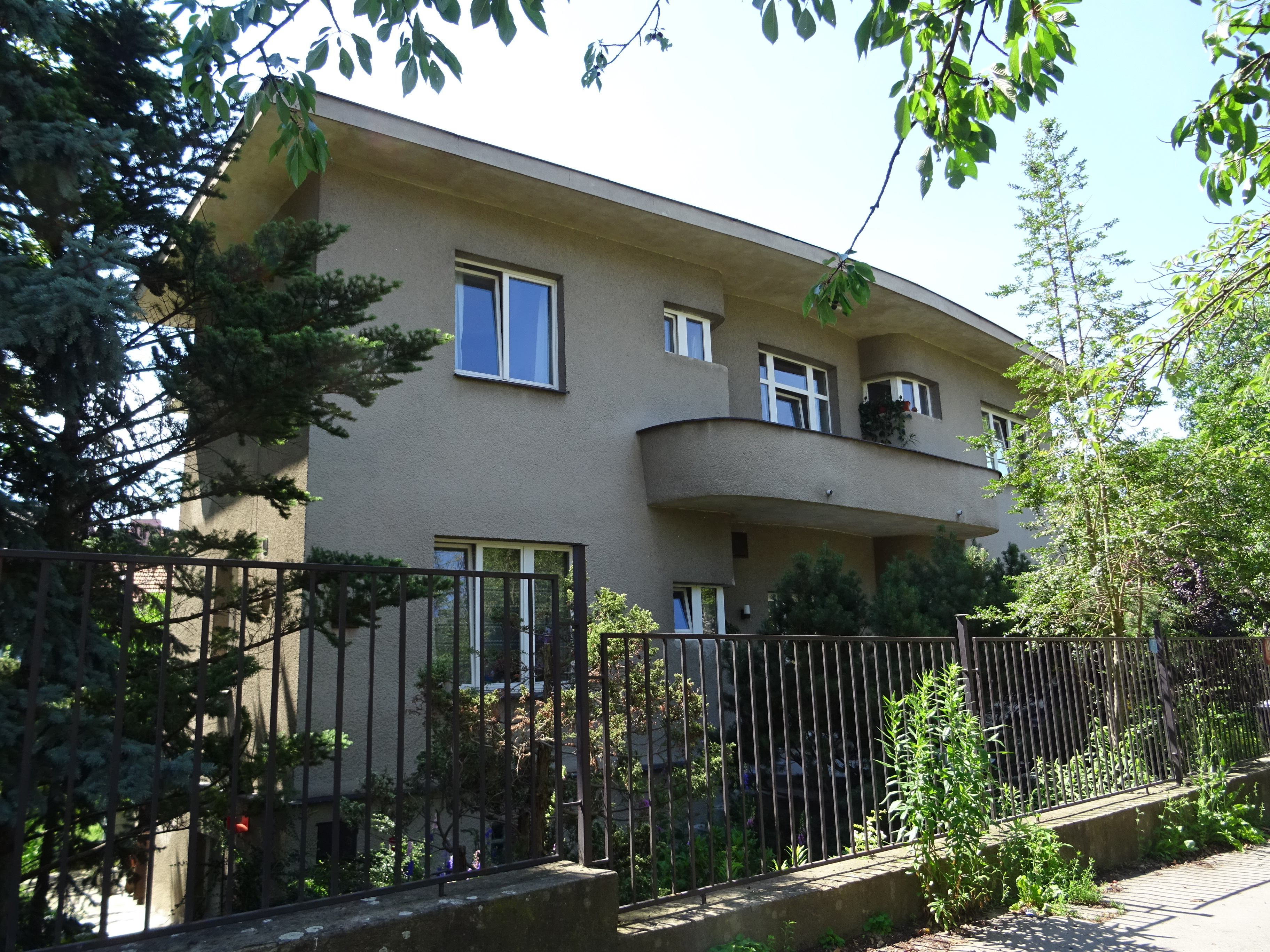 Otto Klein: vila U krbu 1101/4, Praha-Strašnice, dynamický expresionismus; konvexní fasáda, mohutná korunní římsa